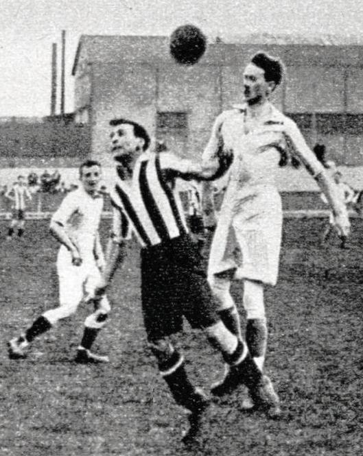 Juste Brouzes, Red Star (maillot rayé), à la lutte avec le grand Lienert.